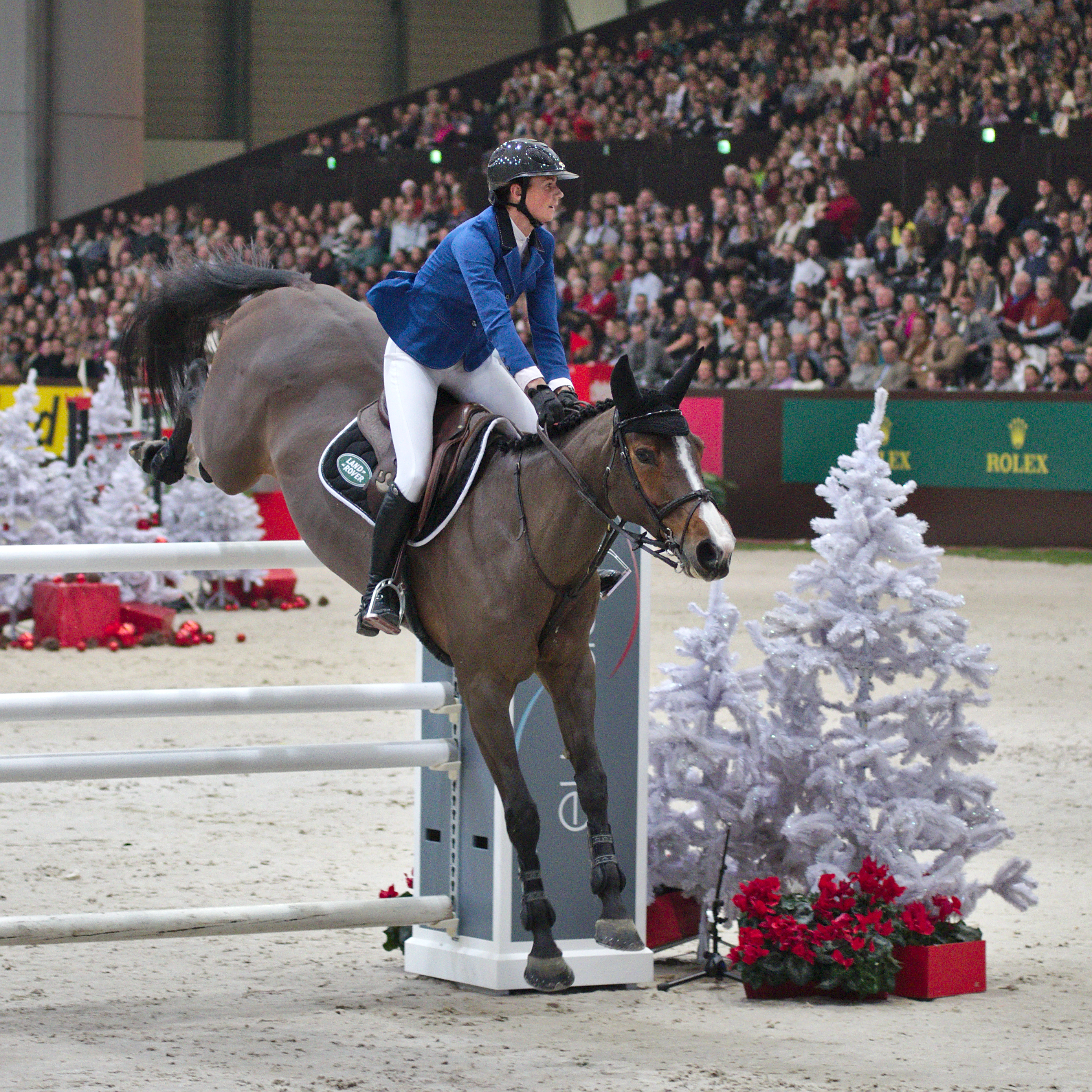 CHI Genève 2013 - 20131214 - Pénélope Leprevost et Nice Stephanie